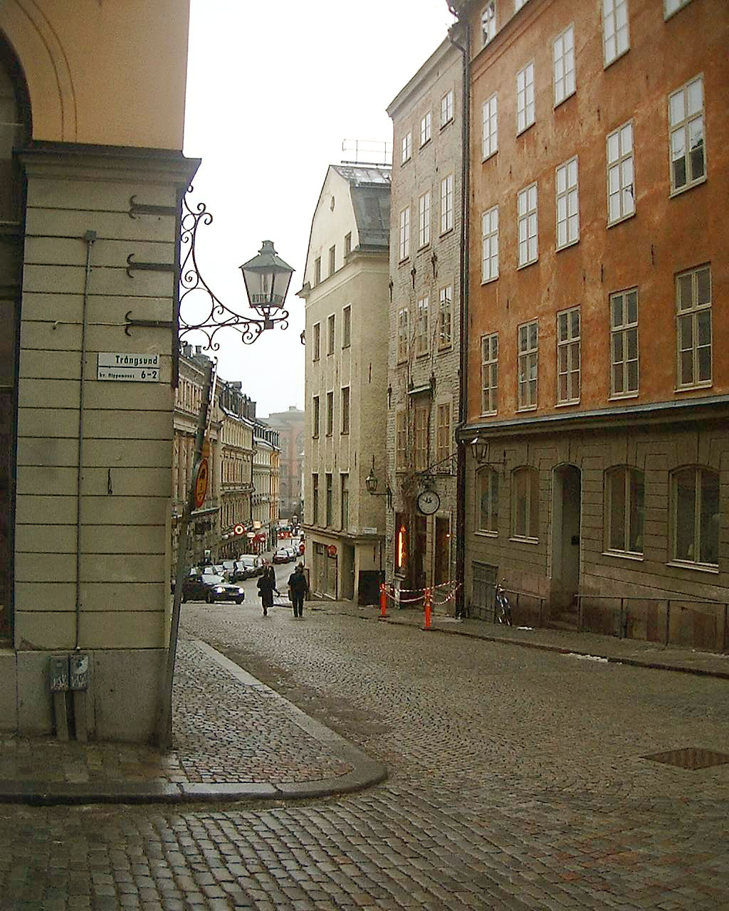 Storkyrkobrinken, Gamla stan, Stockholm